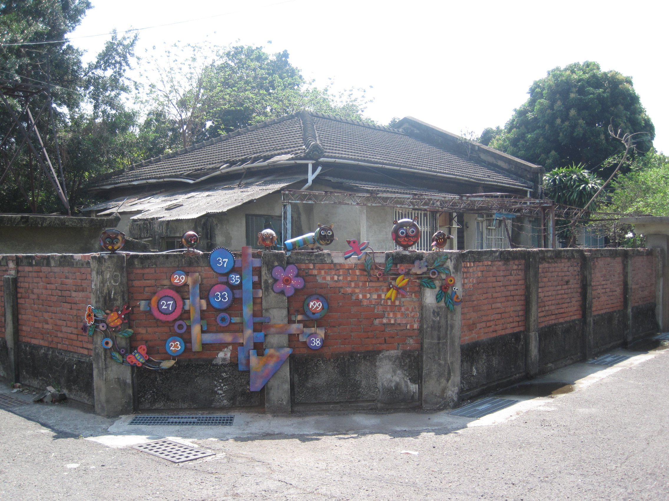 中文（台灣）: 成立「三二一巷藝術聚落」後的原日軍步兵第二聯隊官舍群一景